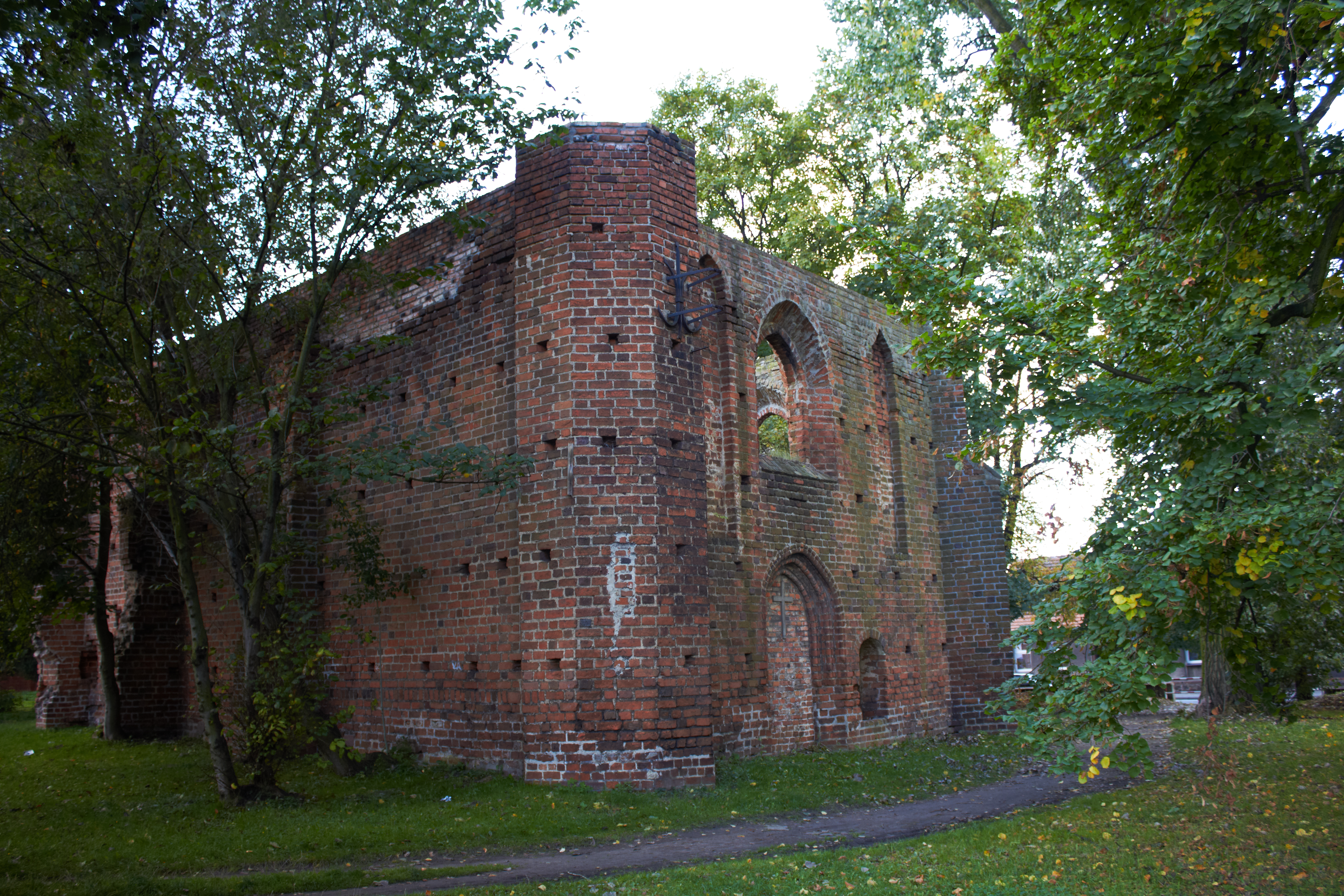 Jarocin, kościół szpitalny p.w. św. Ducha (ruina), 1516